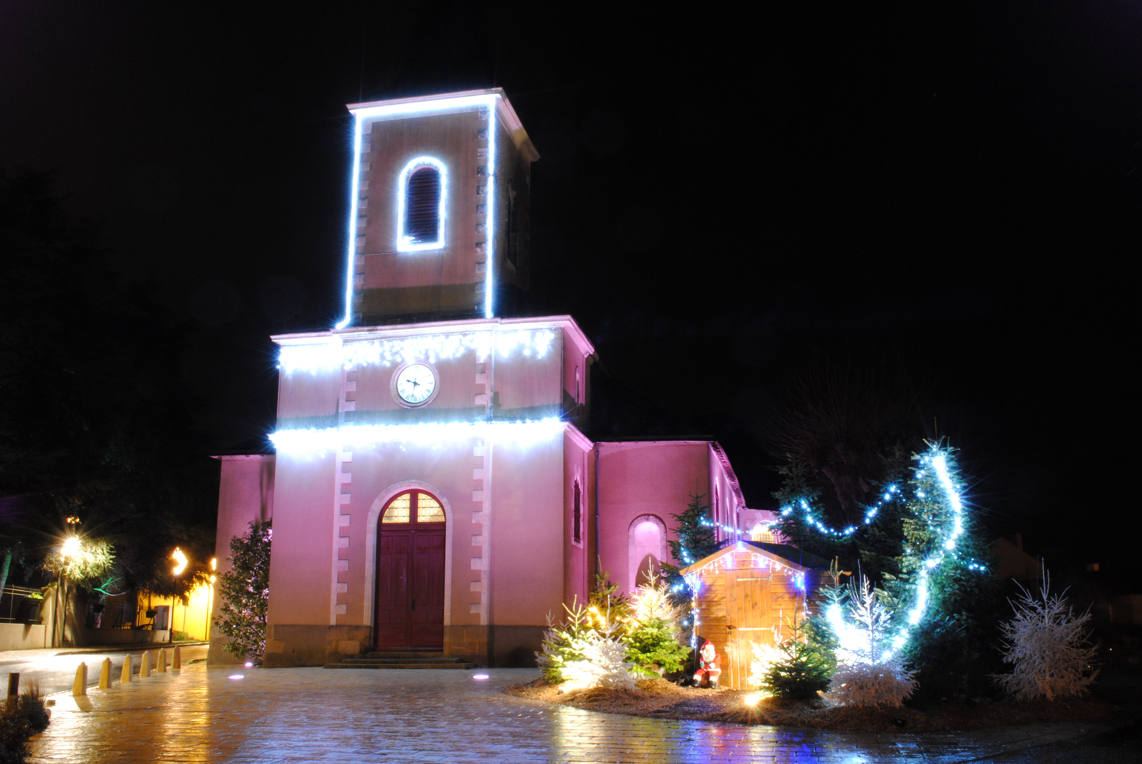 Eglise de Saint Aignan de Grand Lieu décorée pour noël 2012